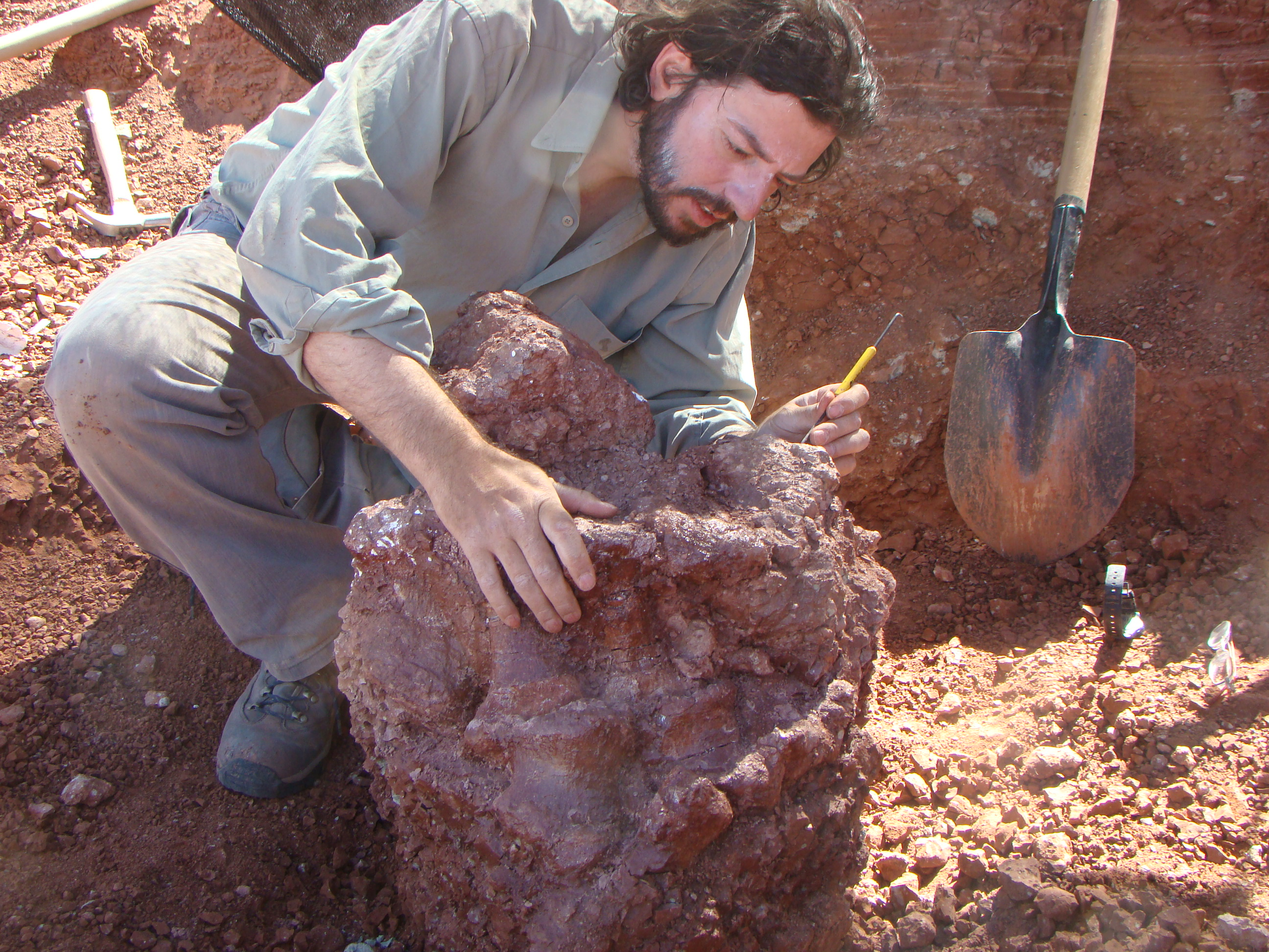 El paleontologo Dr. Bernardo J. Gonzalez Riga descubriendo el pie del dinosaurio Notocolossus.